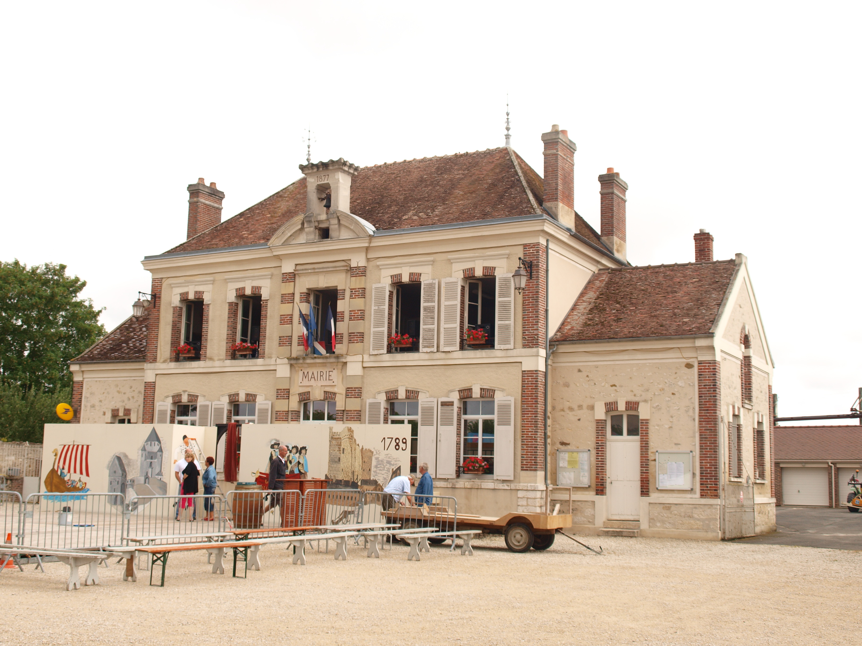 Hermé (Seine-et-Marne, France)